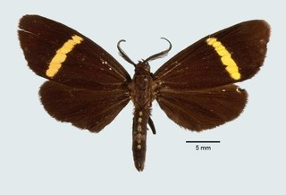 Ephialtias dorsispilota